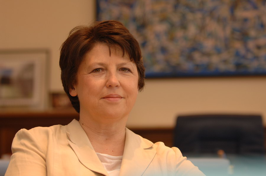 photo de Martine Aubry